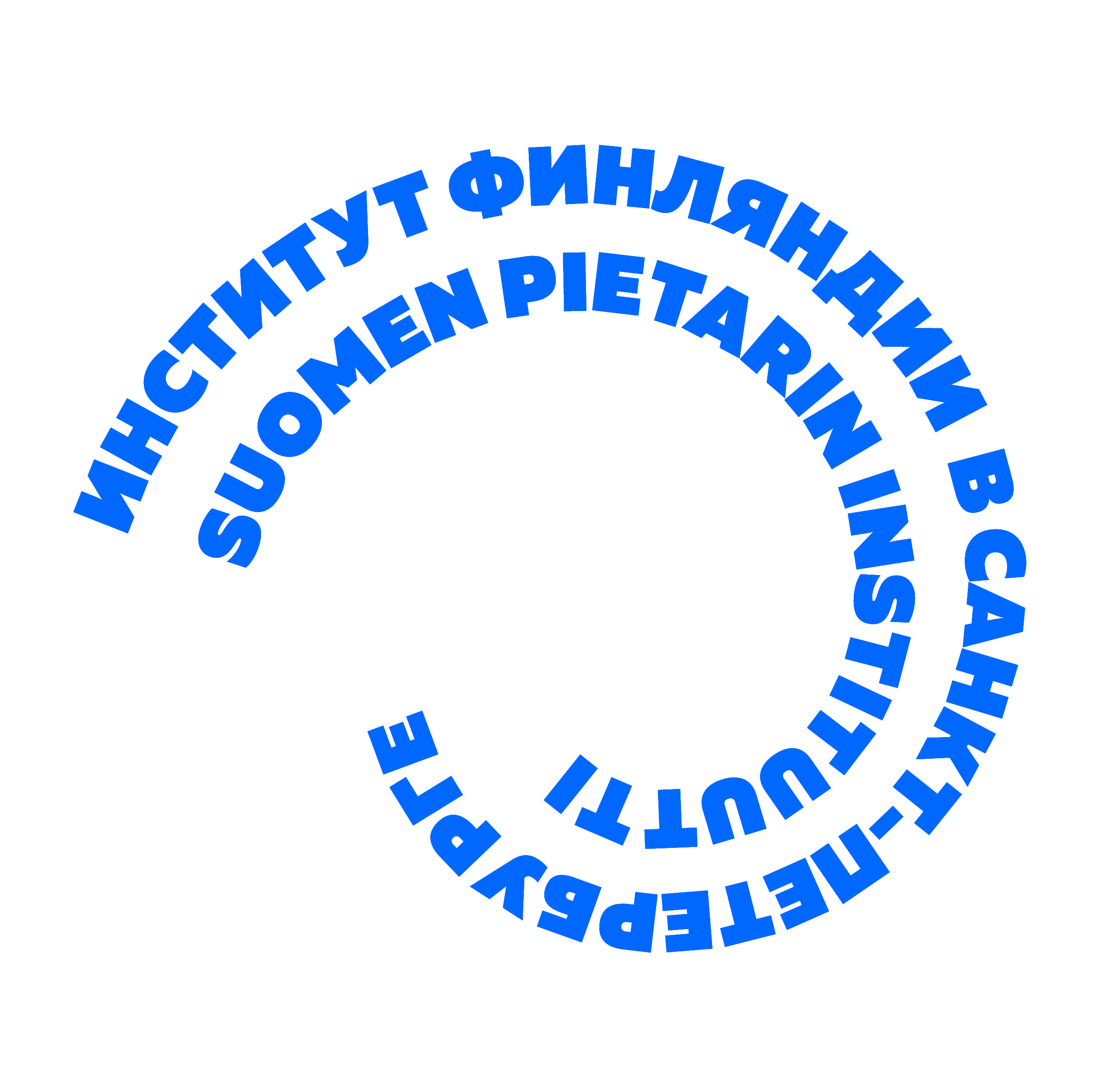 Suomen Pietarin instituutin logo